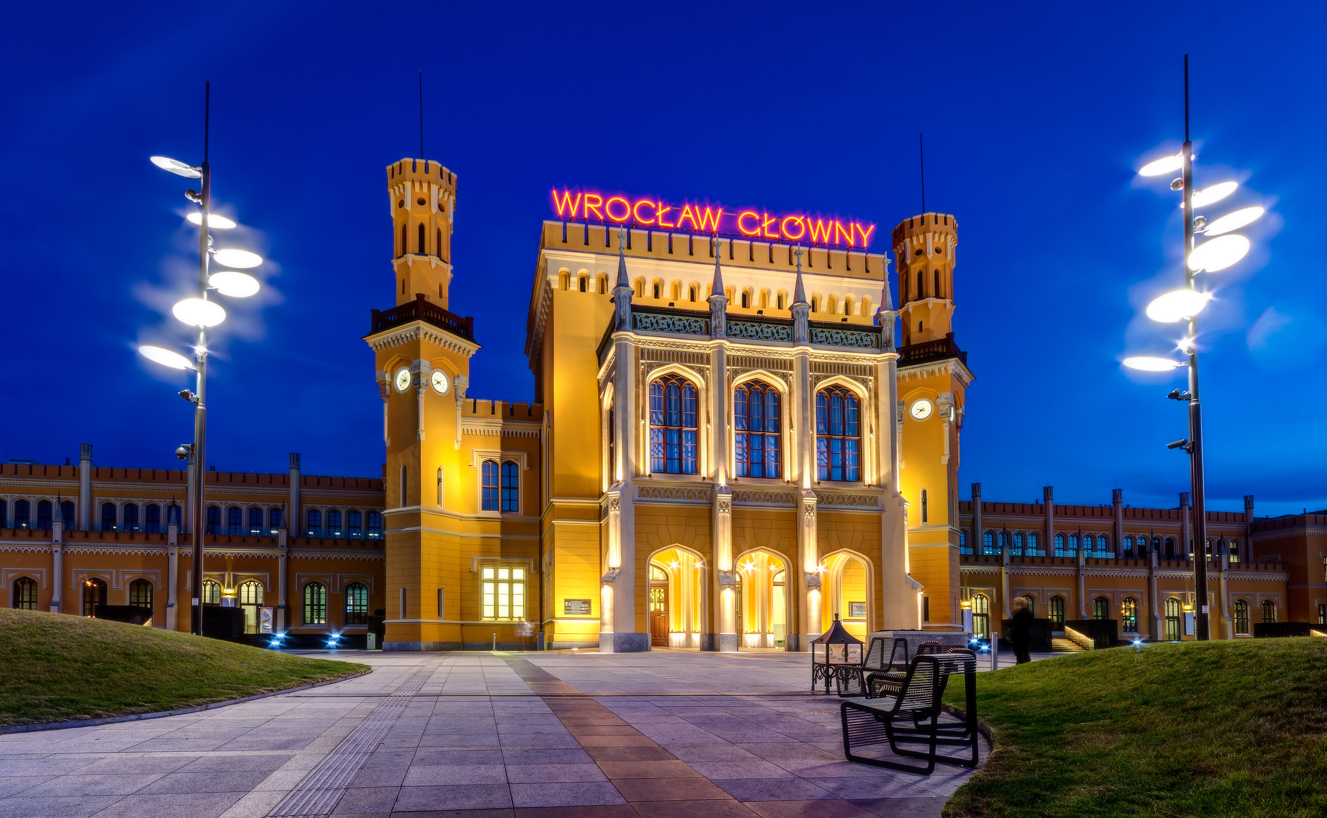 Wrocław, zespół Dworca Głównego, widok wieczorny